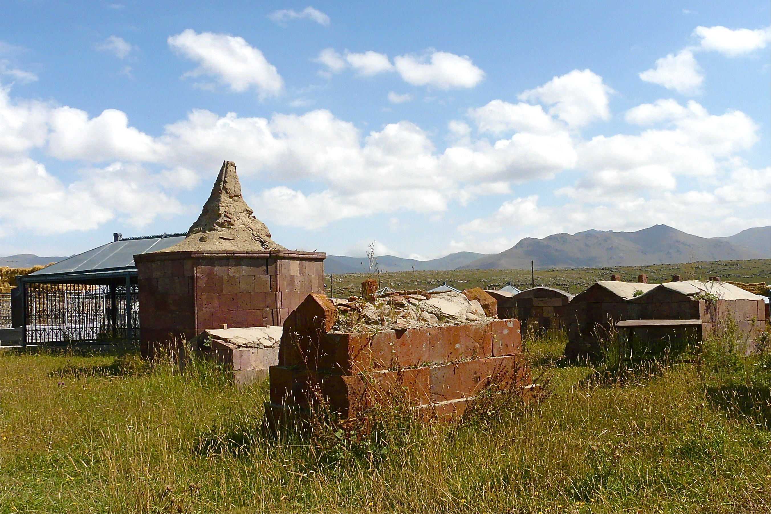 Hun doden worden op een grote weide, in mooi versierde familiehuisjes verder in ere gehouden.